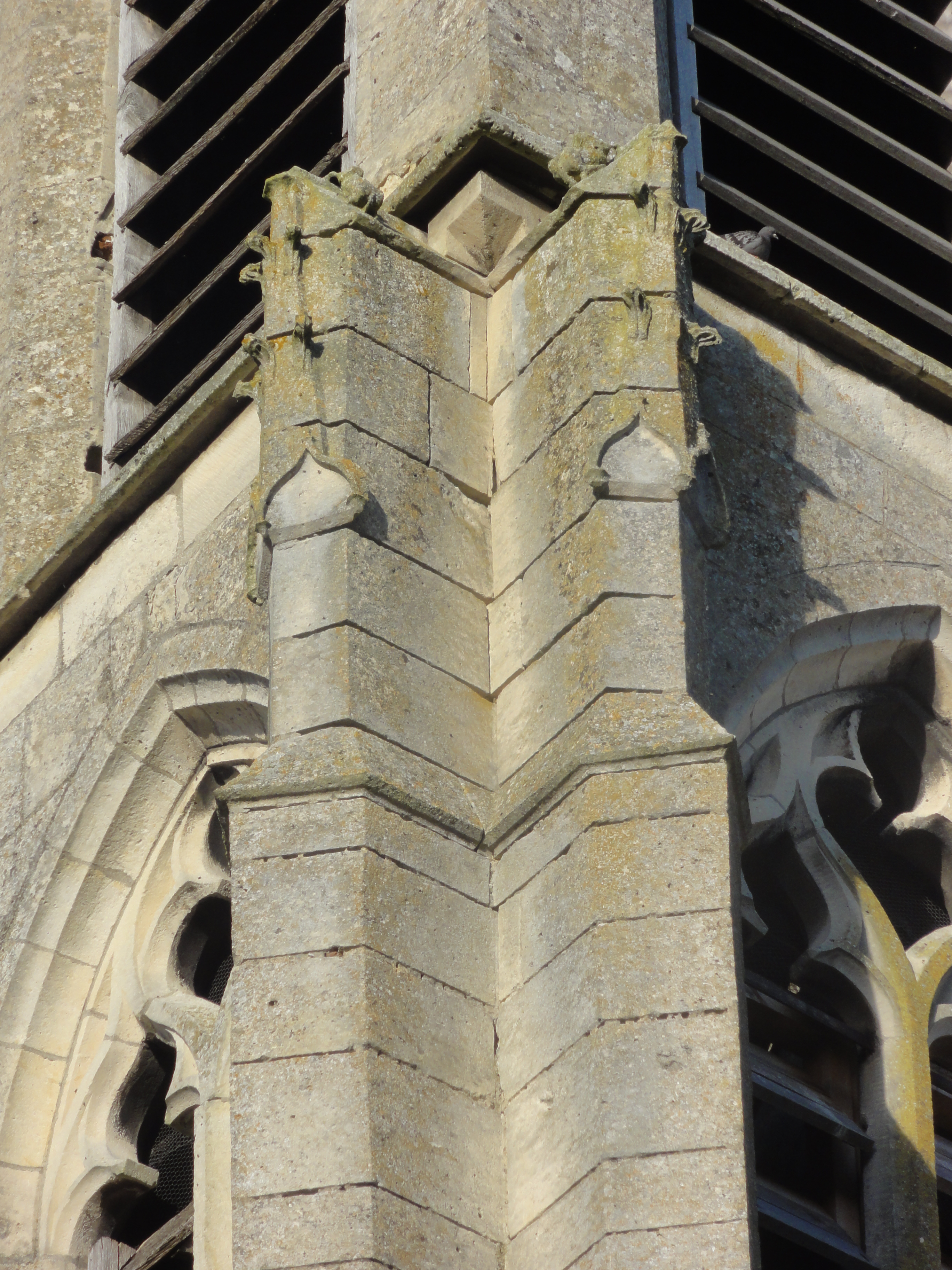 Contreforts du clocher au niveau du 3e étage.